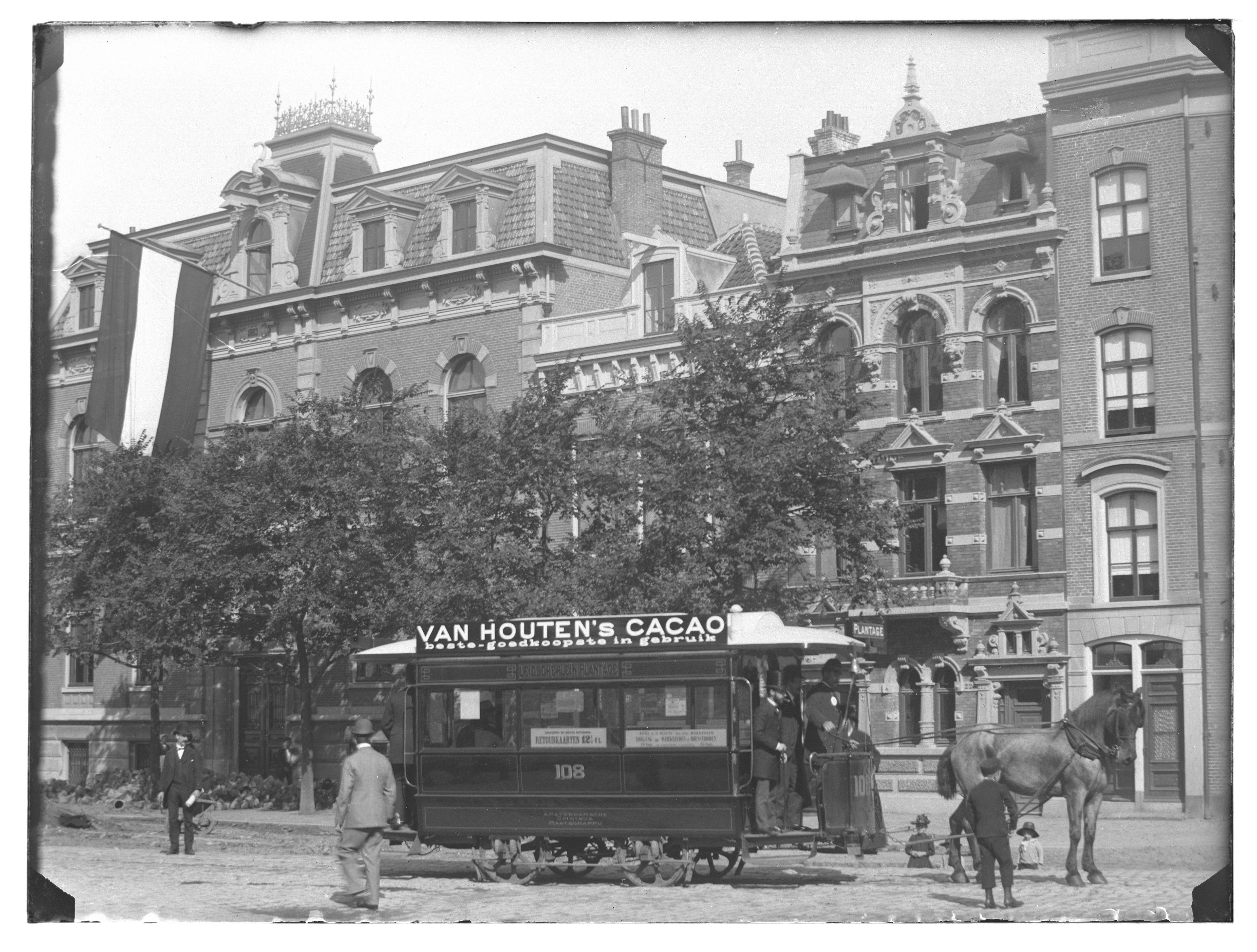 Beschrijving Weteringschans 257-261 (v.l.n.r.) Rechts: gedeelte hoekhuis Huidekoperstraat 20. Paardentram (rijtuig 108) op de lijn Leidscheplein - Plantage. Documenttype foto Vervaardiger Olie``, Jacob (1834-1905) Collectie Collectie Jacob Olie Jbz. Datering 1890 Geografische naam Weteringschans Inventarissen Afbeeldingsbestand 010019000096 Generated with Dememorixer